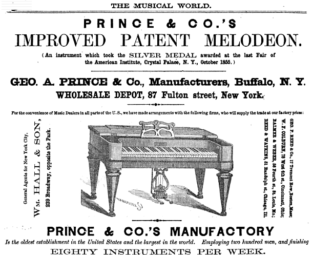 Werbung mit Abbildung eines Melodeons in: Musical world, Bände 11-13, Juni 1855, Seite 360